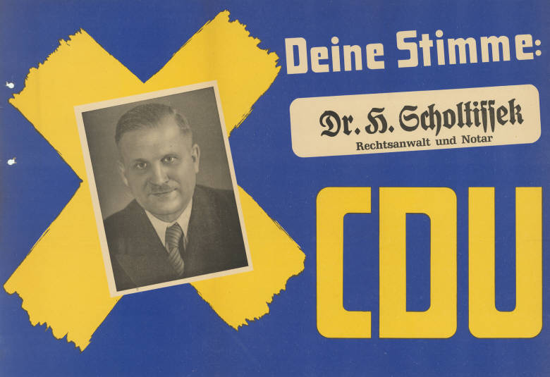 Deine Stimme: Dr. H. Scholtissek Rechtsanwalt und Notar CDU Abbildung: Porträtfoto - Stimmkreuz Plakatart: Kandidaten-/Personenplakat mit Porträt Objekt-Signatur: 10-009 : 183 Bestand: Landtagswahlplakate Nordrhein-Westfalen (10-009) GliederungBestand10-18: Landtagswahlplakate Nordrhein-Westfalen (10-009) » Landtagswahl am 18.6.1950 » CDU » mit Porträtfoto Lizenz: KAS/ACDP 10-009 : 183 CC-BY-SA 3.0 DE